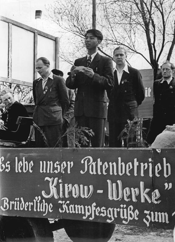 Luppa, 1. Mai Feier, Ansprache eines chinesischen Gaststudenten Zentralbild Illner Bae-Ho. 5 Motive 19.5.1954 1. Mai in Luppa Die Belegschaft des Kirow-Werkes feierte mit ihrem Patendorf Luppa gemeinsam den 1. Mai. UBz: Ein chinesischer Student, der gemeinsam mit koreanischen Freunden an den Maifeierlichkeiten in Luppa teilnahm, sprach zu den Werktätigen.